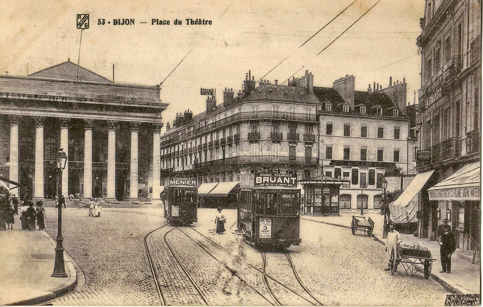 Carte postale ancienne éditée par R. G. à Dijon, n°53.Dijon - La Place du Théâtre.Ancien tramway de Dijon - Deux tramways sur la bifurcation de la Place du Théâtre